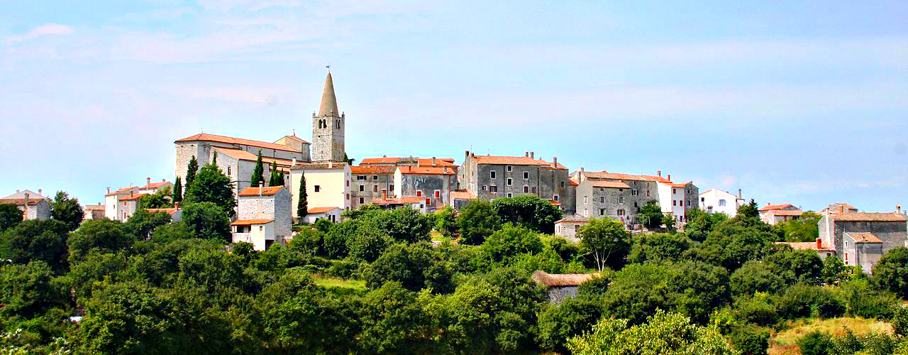 Panorama di Valle d'Istria.